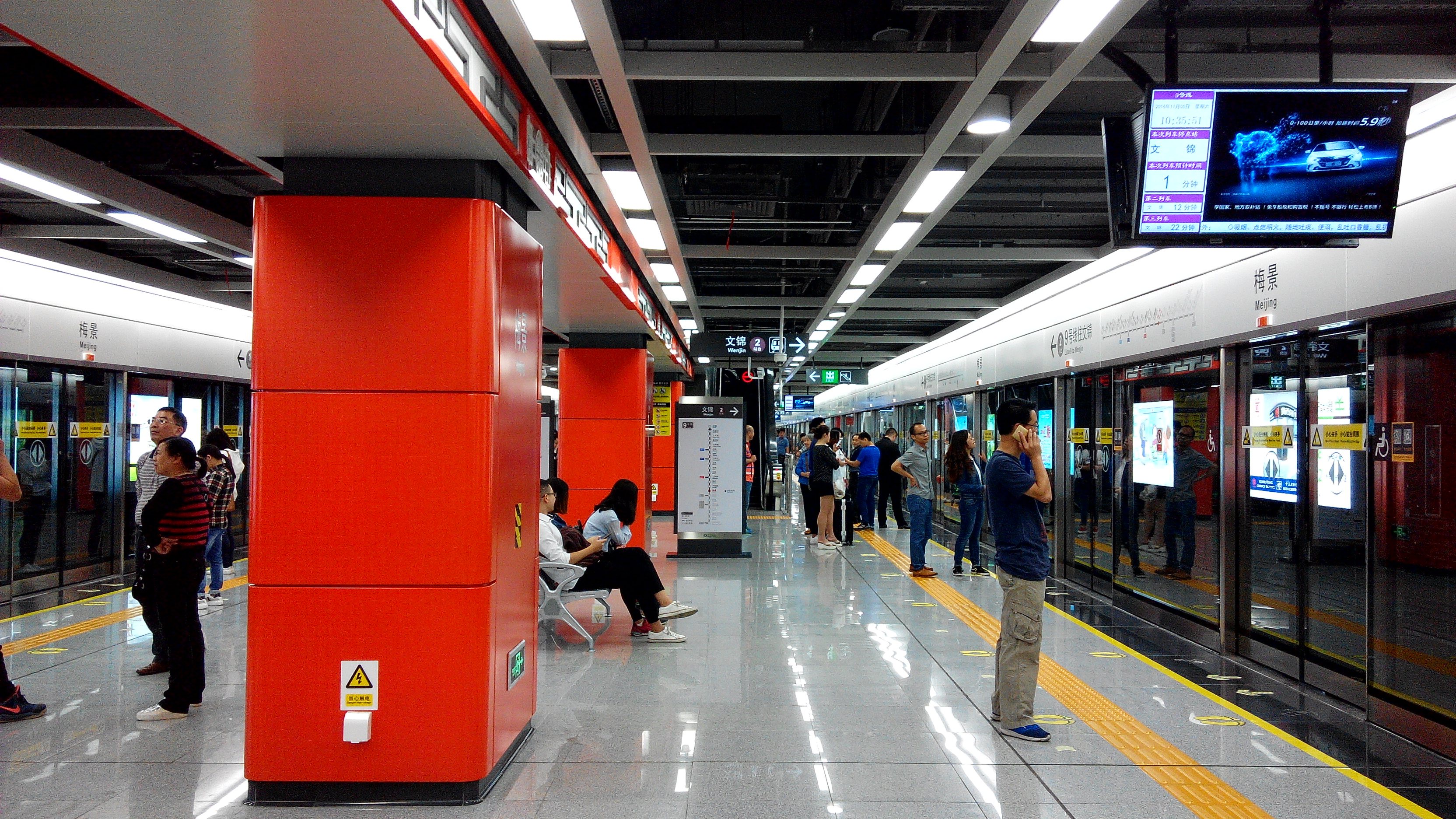 深圳地铁9号线 梅景站站台